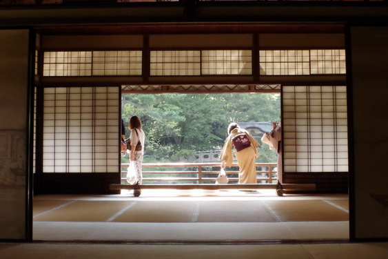 臨春閣の障子。臨春閣は桃山時代に豊臣秀吉が建てた聚楽第の遺構と伝えられていたが、現在では和歌山県岩出市にあった紀州徳川家の別荘・巌出御殿（いわでごてん）ではないかと考えられている。現在横浜三渓園